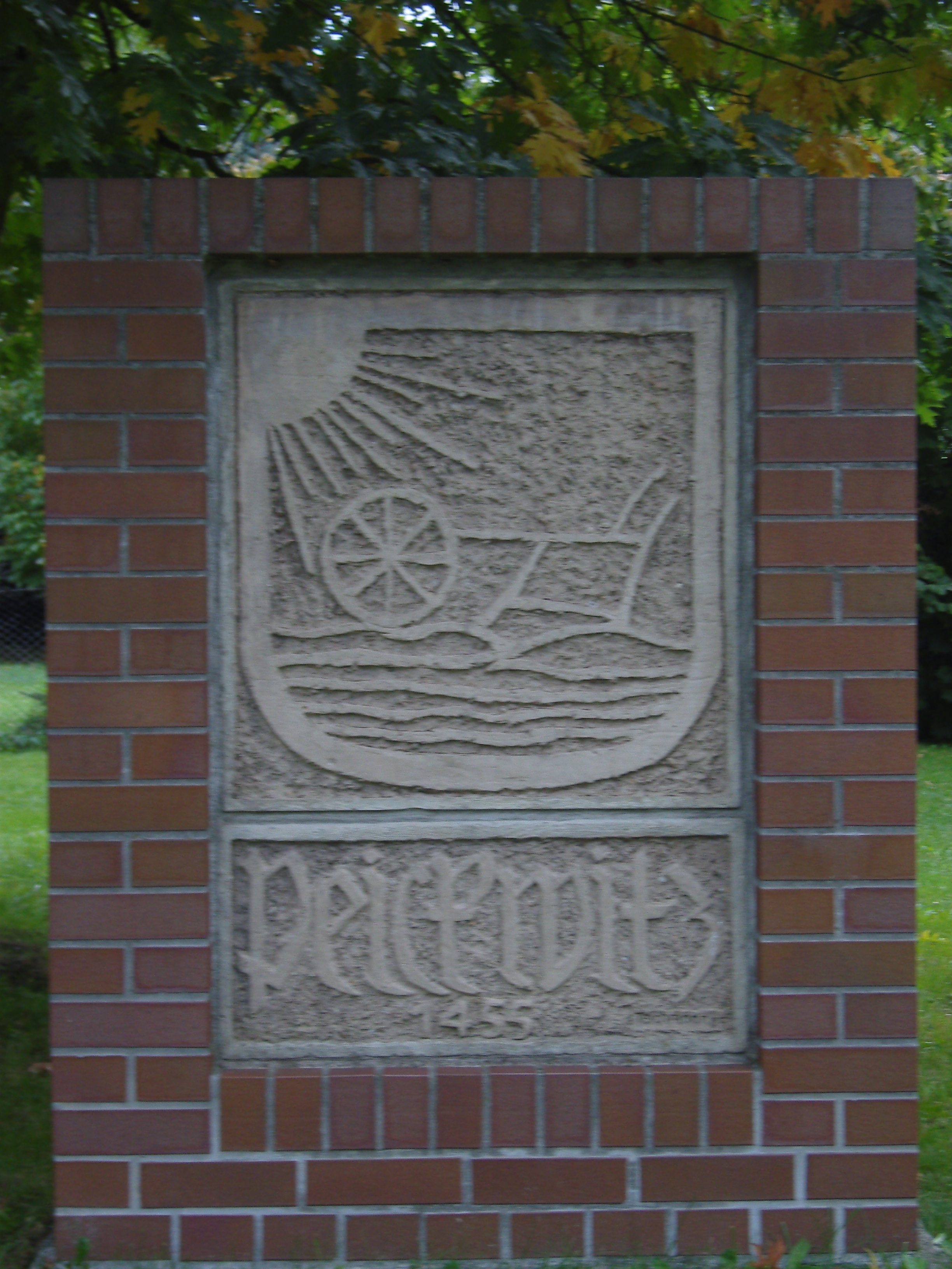 Wappen des Senftenberger Ortsteils Peickwitz - dargestellt ist ein sogenannter Schiebock auf dem Feld